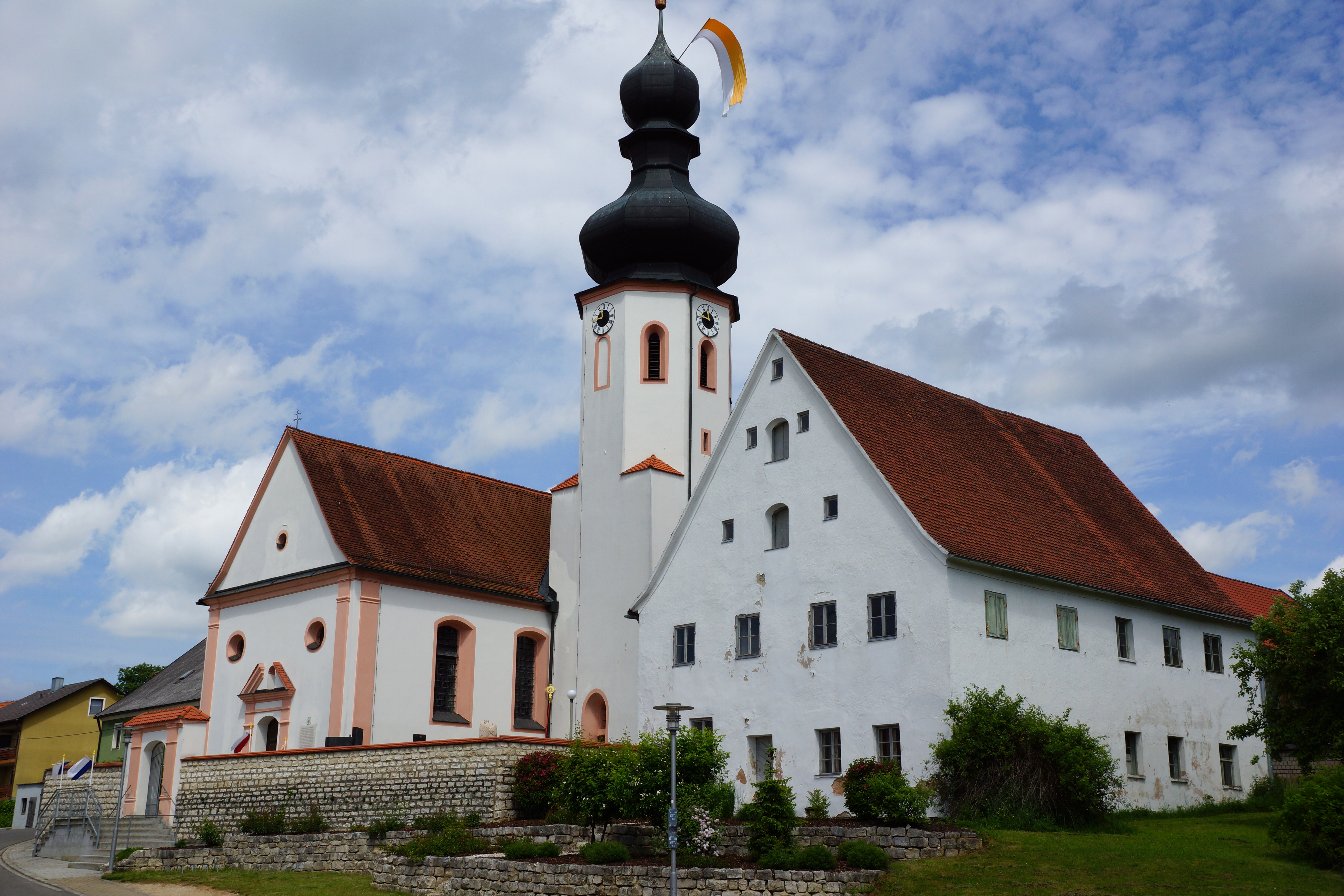 Die katholische Pfarrkirche St. Vitus in Großalfalterbach bei Deining in der Oberpfalz